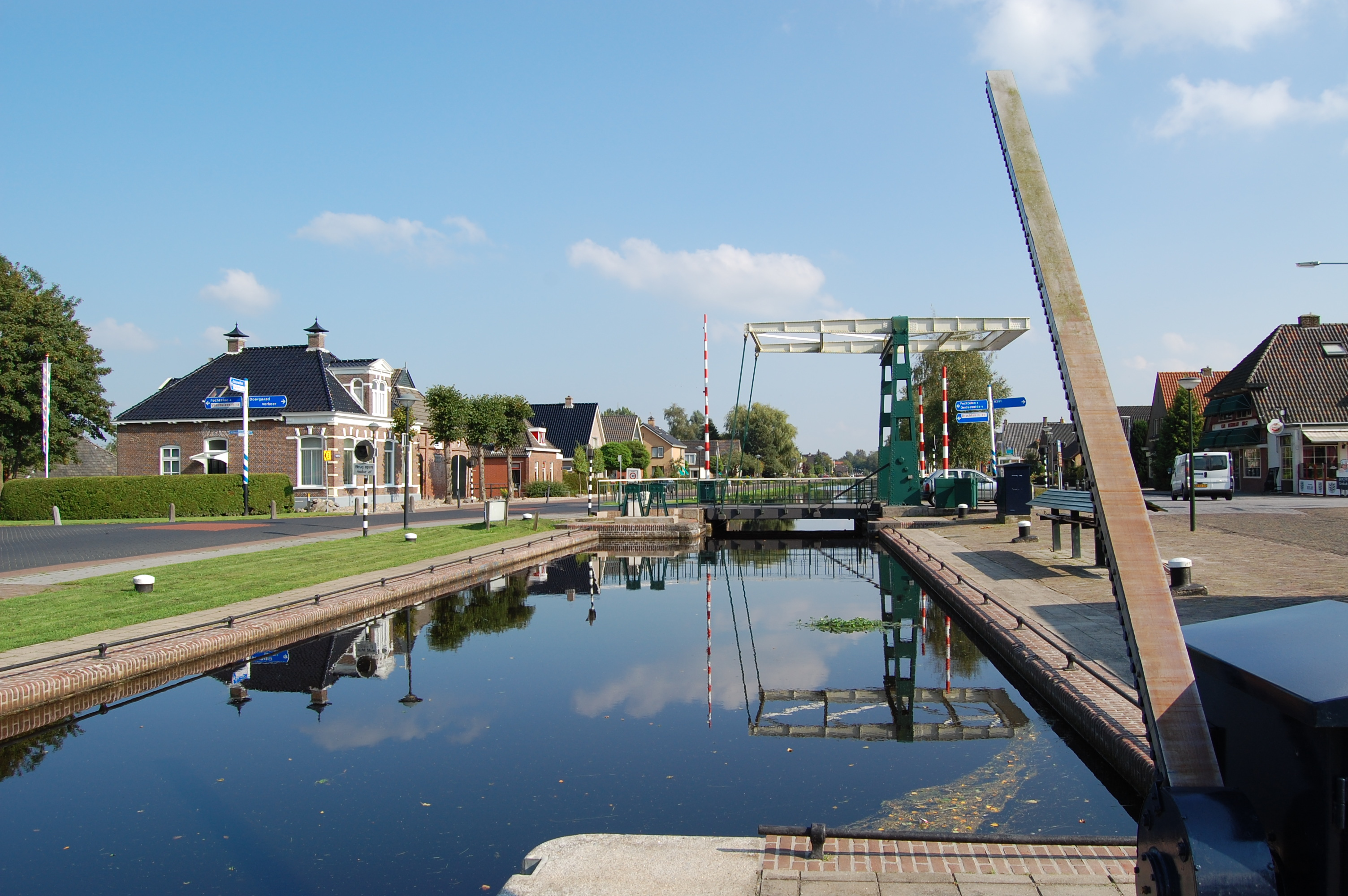 Het Stokersverlaat (sluis) in Appelscha in de Opsterlandse-Compagnonsvaart